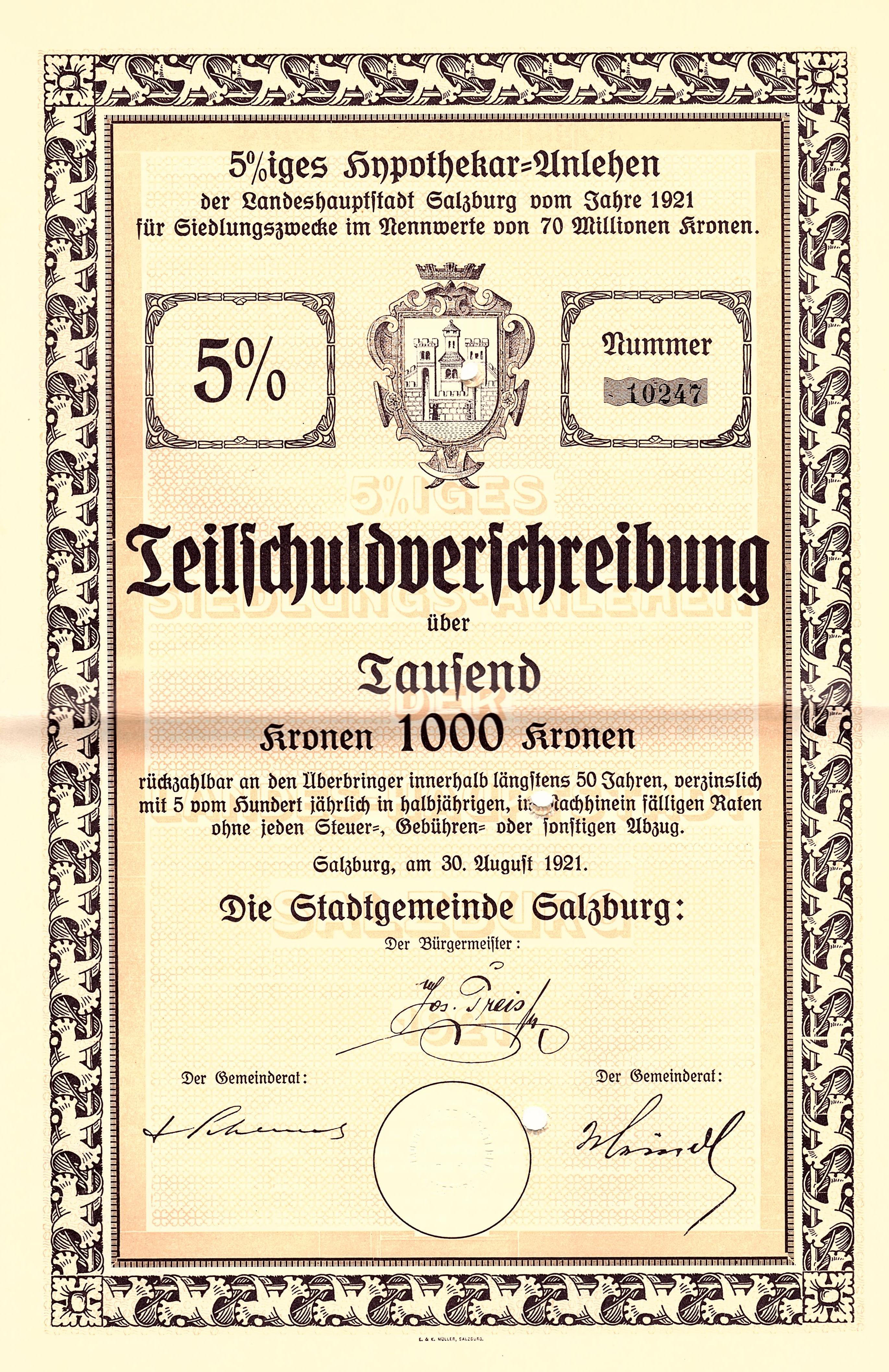 Teilschuldverschreibung über 1000 Kronen der Landeshauptstadt Salzburg vom 30. August 1921